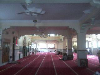 مسجد الجود و الكمال من الداخل